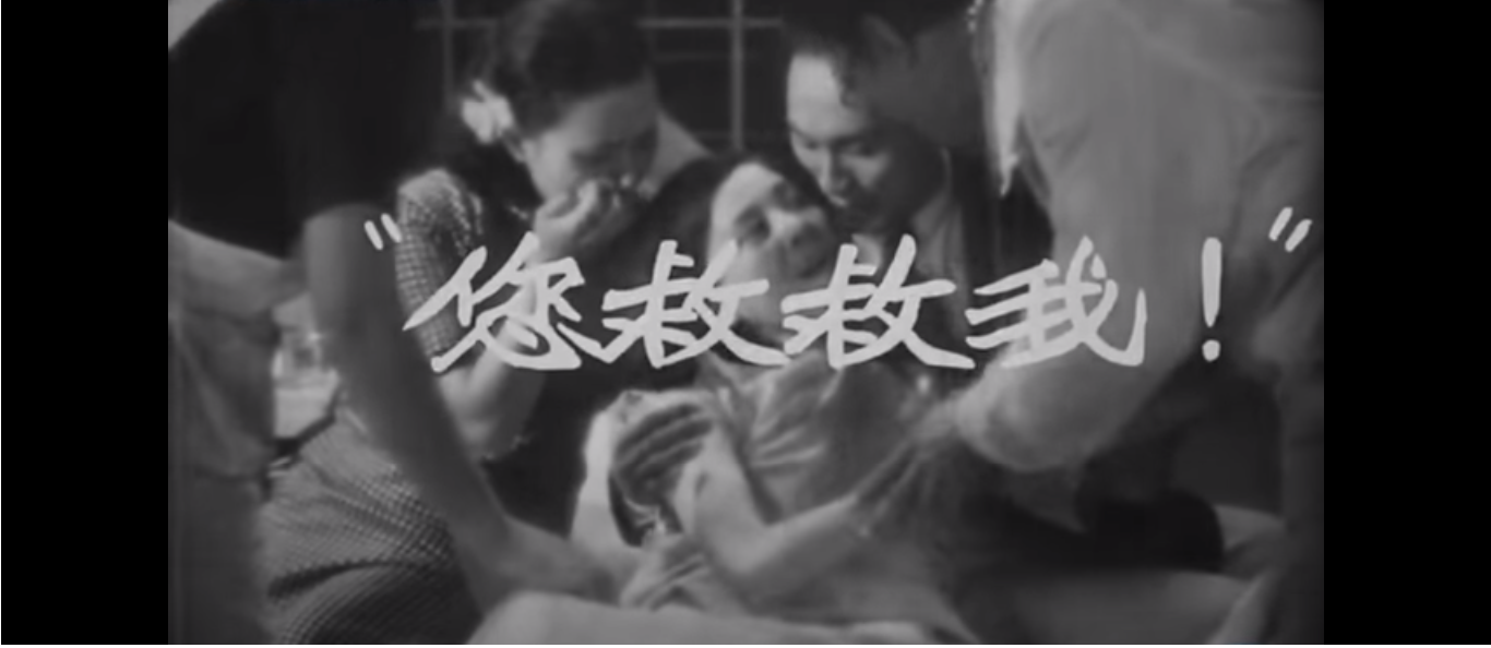 Escena de la película "Mujeres Nuevas", 1935.